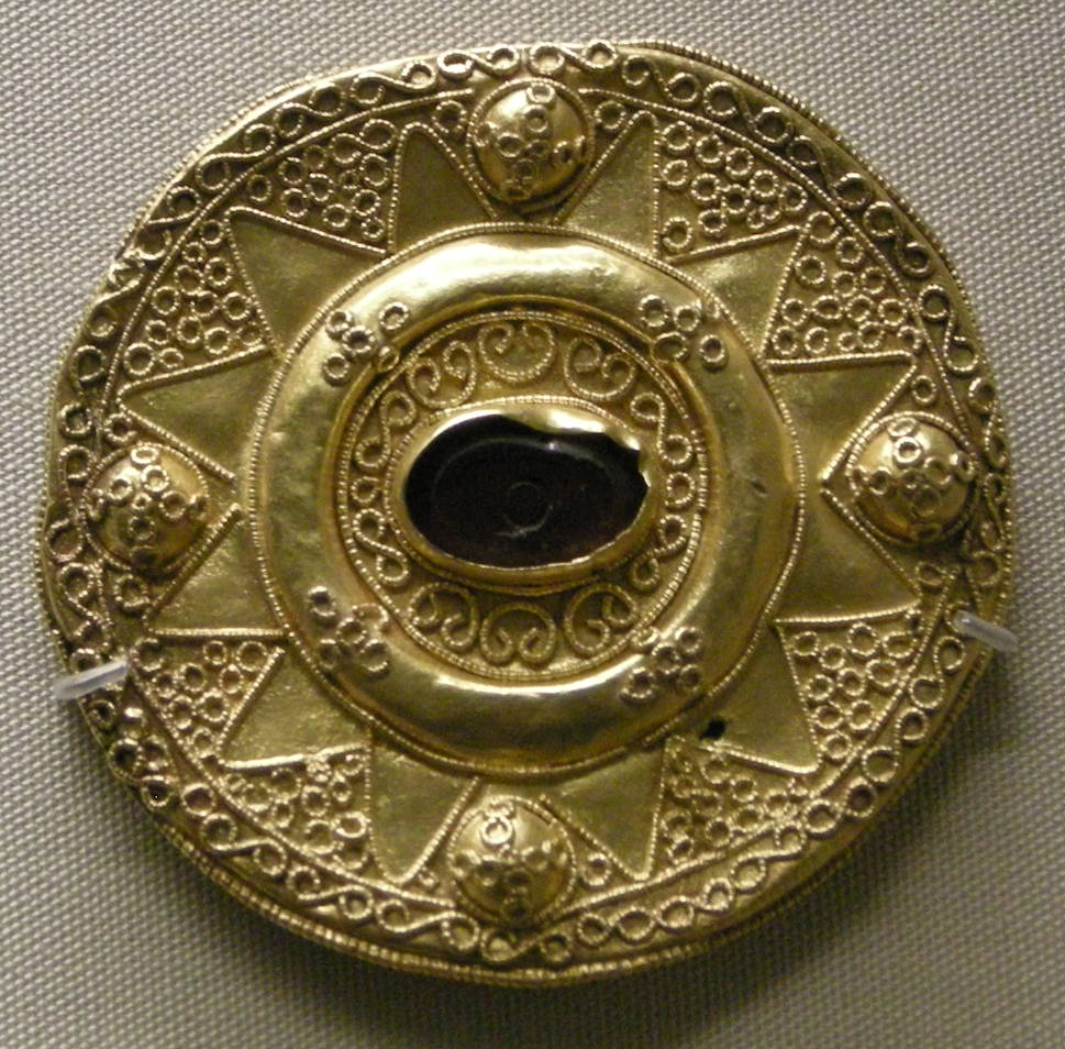 Arte longobarda, da castel trosino, marche, spilla d'oro a disco con granata e decorazione a filigrana, VII sec